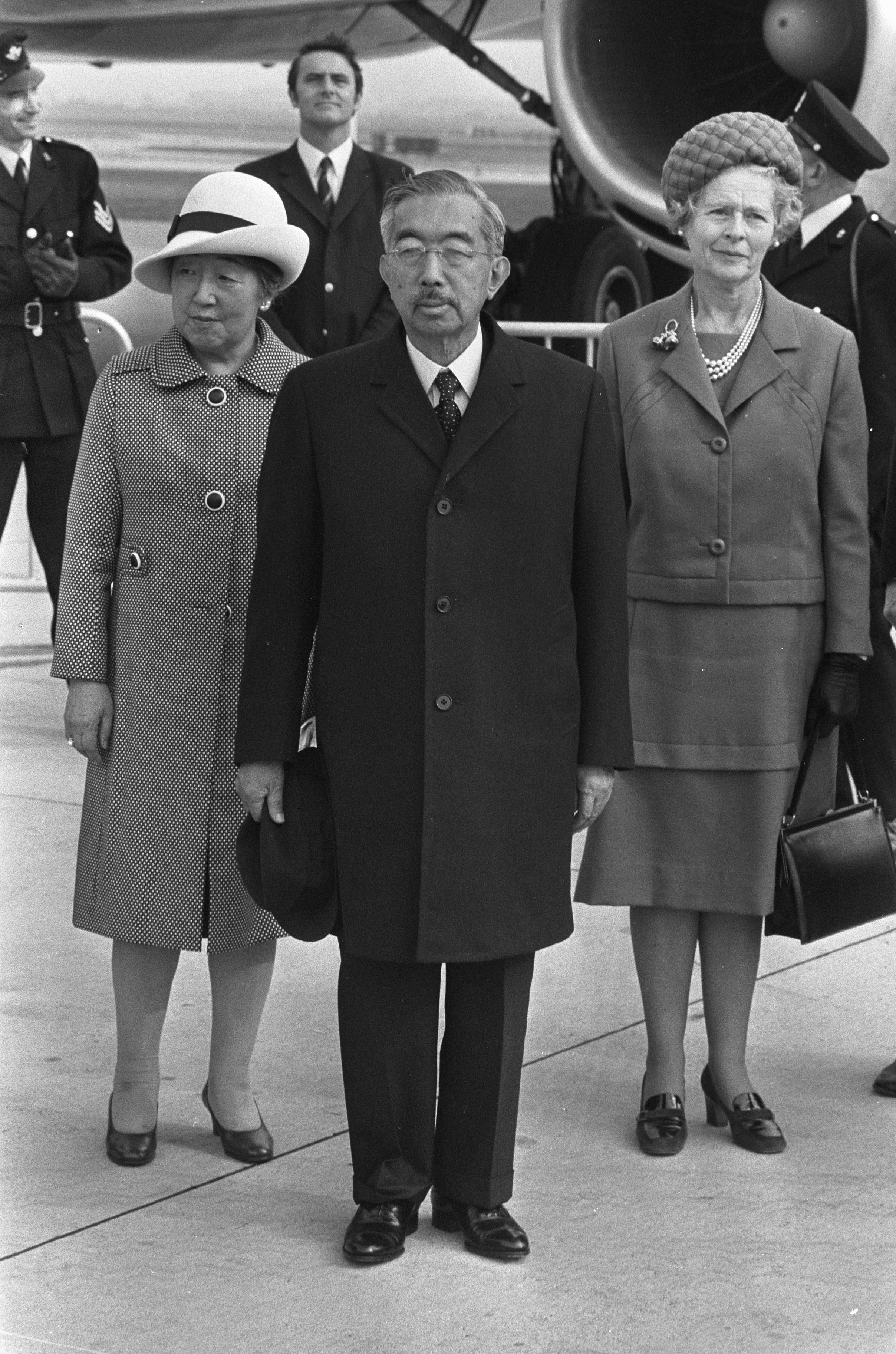 Collectie / Archief : Fotocollectie Anefo Reportage / Serie : [ onbekend ] Beschrijving : Tweedaags bezoek Keizer Hirohito en Keizerin Nagako a an Nederland, Keizer en Keizerin ten voeten uit Datum : 8 oktober 1971 Locatie : Nederland Trefwoorden : KEIZERINNEN, bezoeken, keizers Persoonsnaam : Hirohito, keizer van Japan, Nagako, keizerin van Japan Fotograaf : Evers, Joost / Anefo Auteursrechthebbende : Nationaal Archief Materiaalsoort : Negatief (zwart/wit) Nummer archiefinventaris : bekijk toegang 2.24.01.05 Bestanddeelnummer : 925-0238